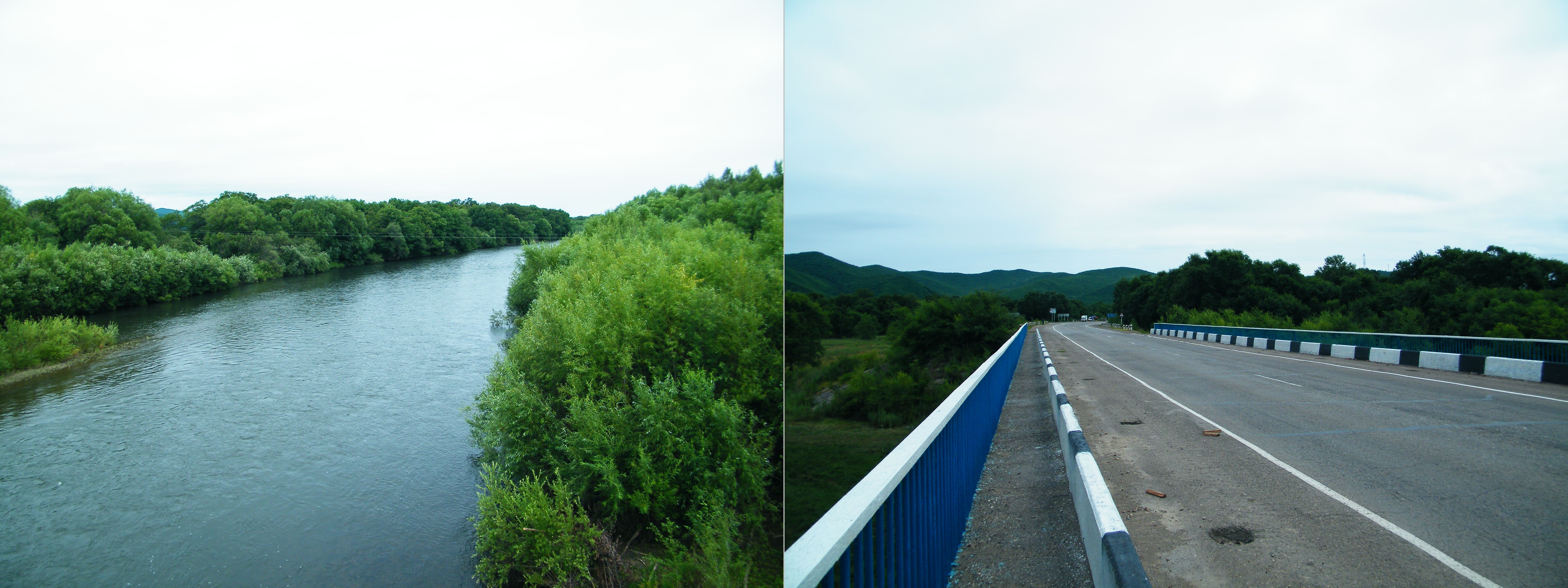 Река Павловка в Чугуевском районе (мост вблизи перекрёстка автодороги А181 и "Восток")